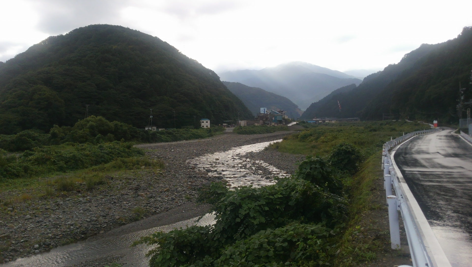 境川（新潟富山県境、国道8号橋梁付近の富山県側より上流方向撮影）